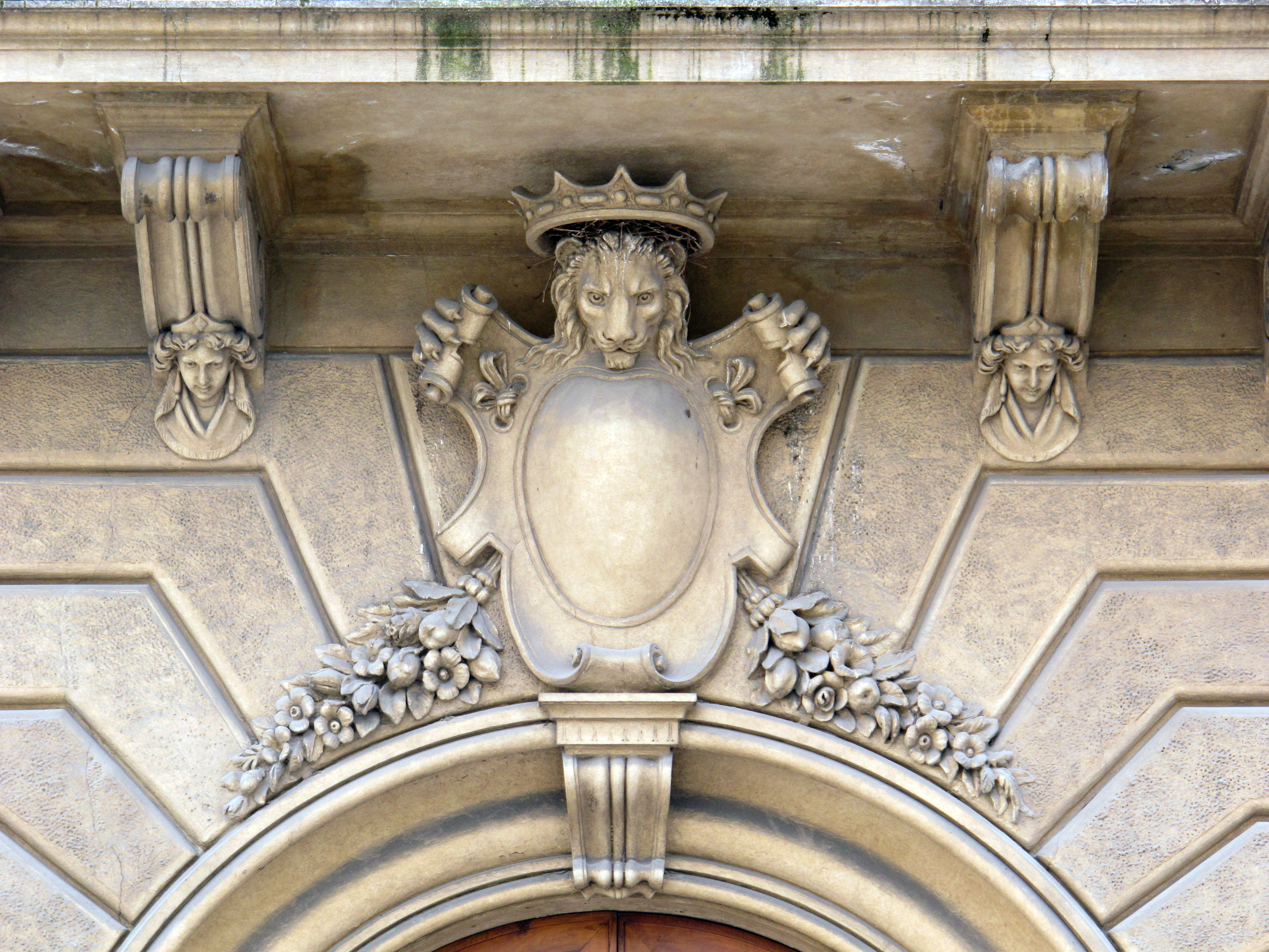 Piazza d'azeglio 22, palazzina carandini 03 stemma su portale